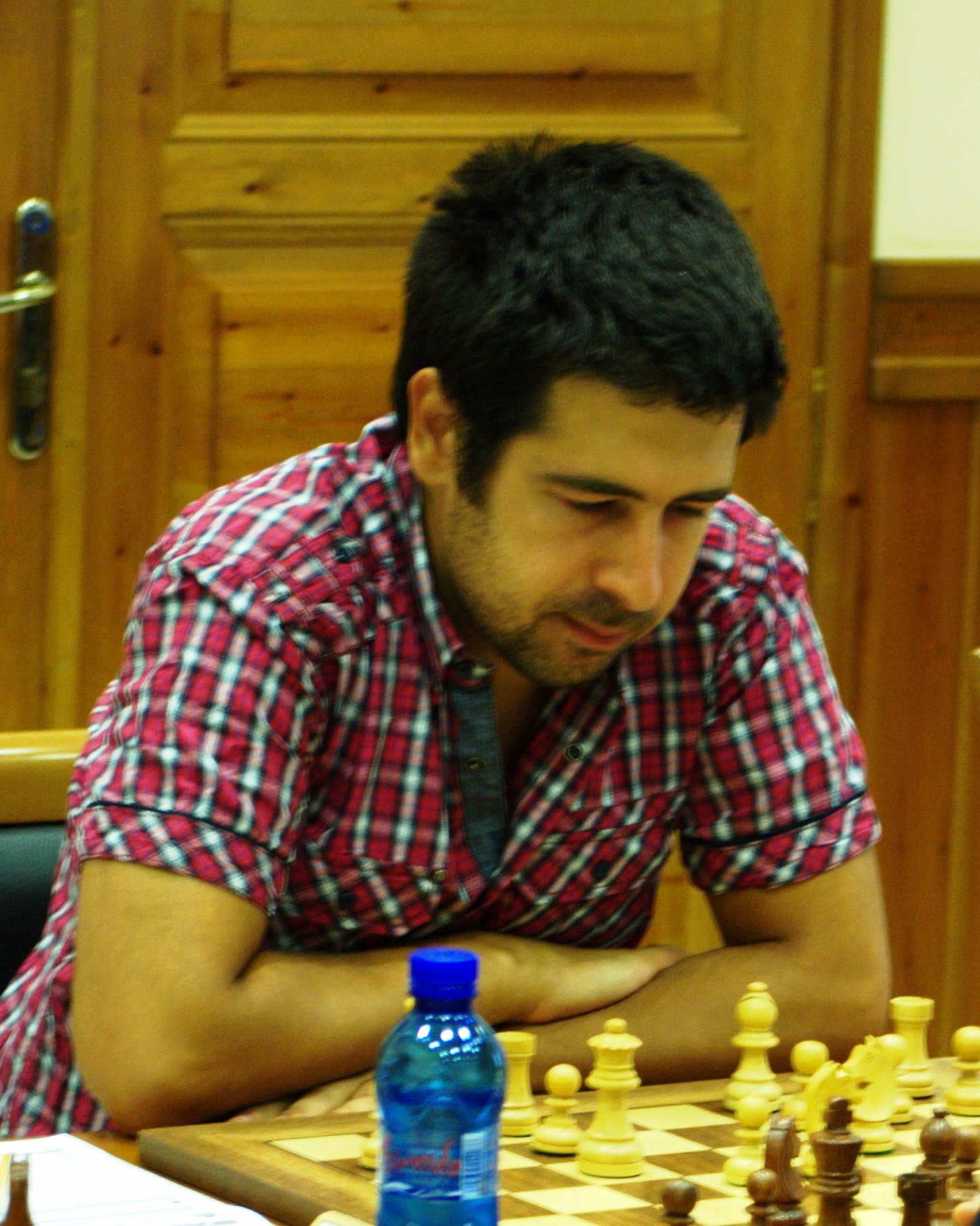 GM Dragan Šolak (Serbia), Kavala Open 2011